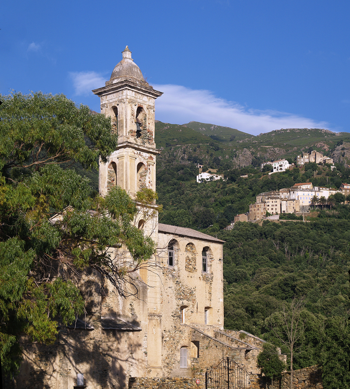 Oletta (Corse) - Ancien couvent Saint-François